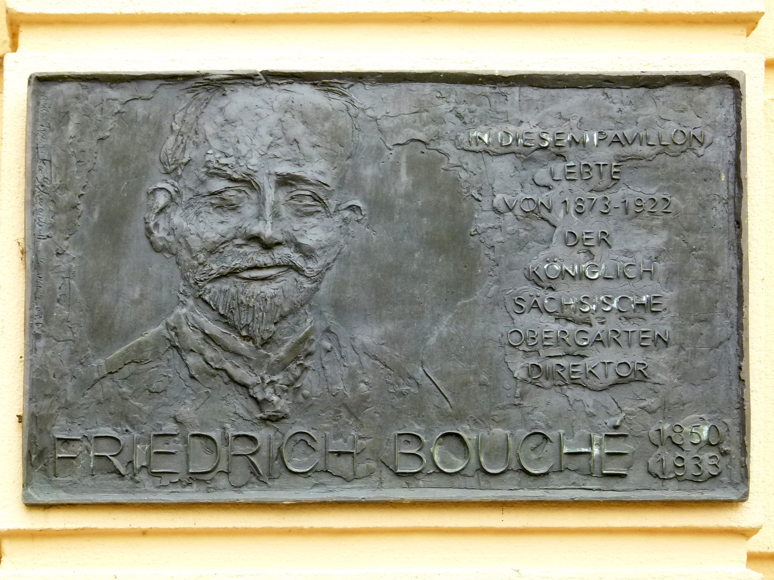 Gedenktafel für Friedrich Bouché an seinem damaligen Wohnhaus im Großen Garten, dem Kavaliershaus D, Hauptallee 12, Dresden, Künstlerin: Anna Franziska Schwarzbach